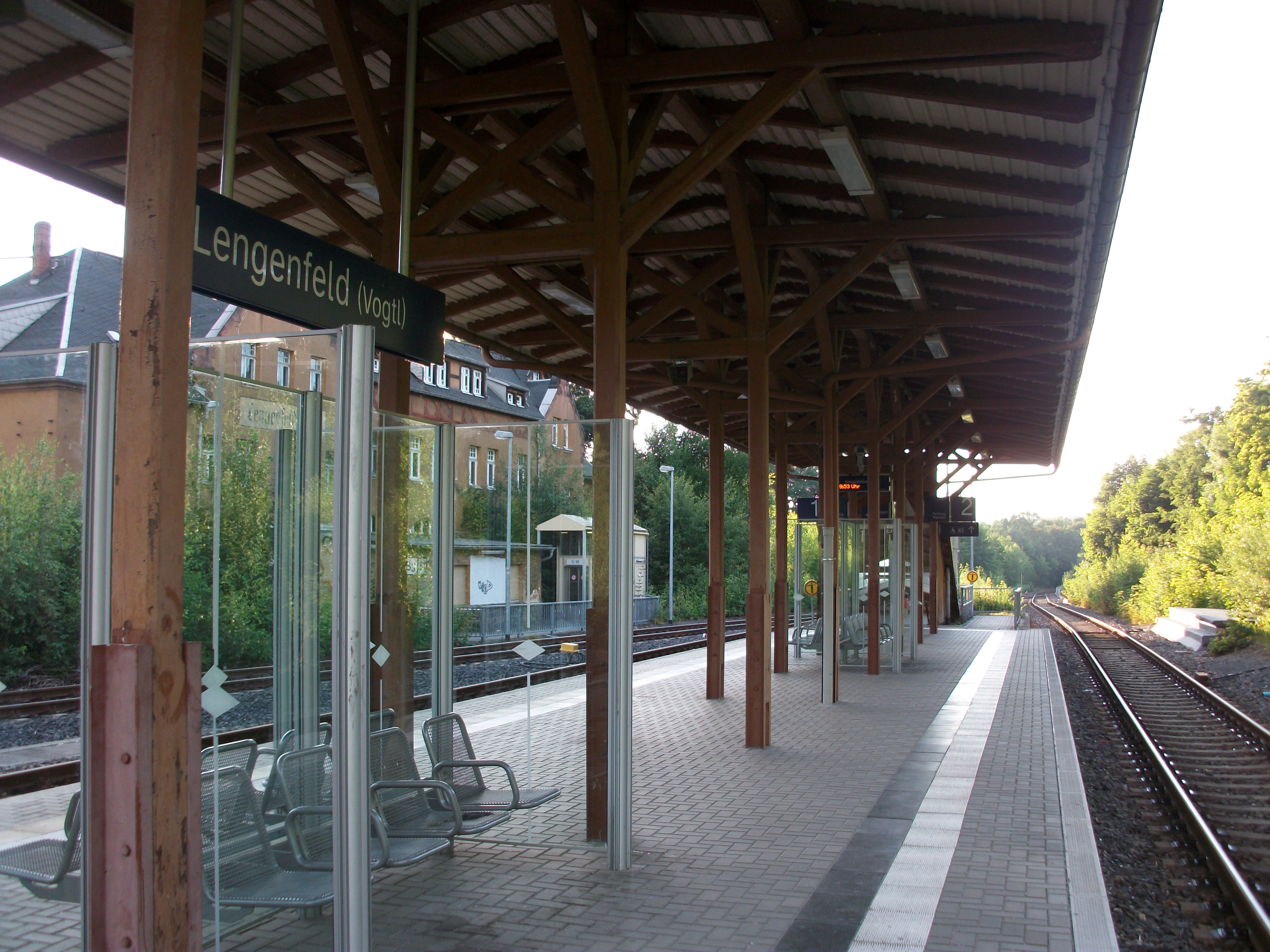 Bahnhof Lengenfeld (Vogtl), Bahnsteige (2017)